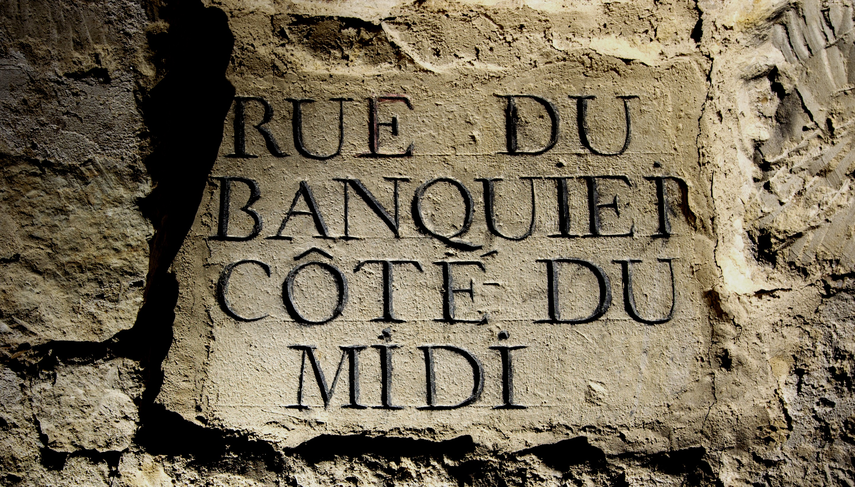 Plaque de la rue du Banquier dans les carrières souterraines de Paris. Côté du Midi, c'est-à-dire trottoir sud.